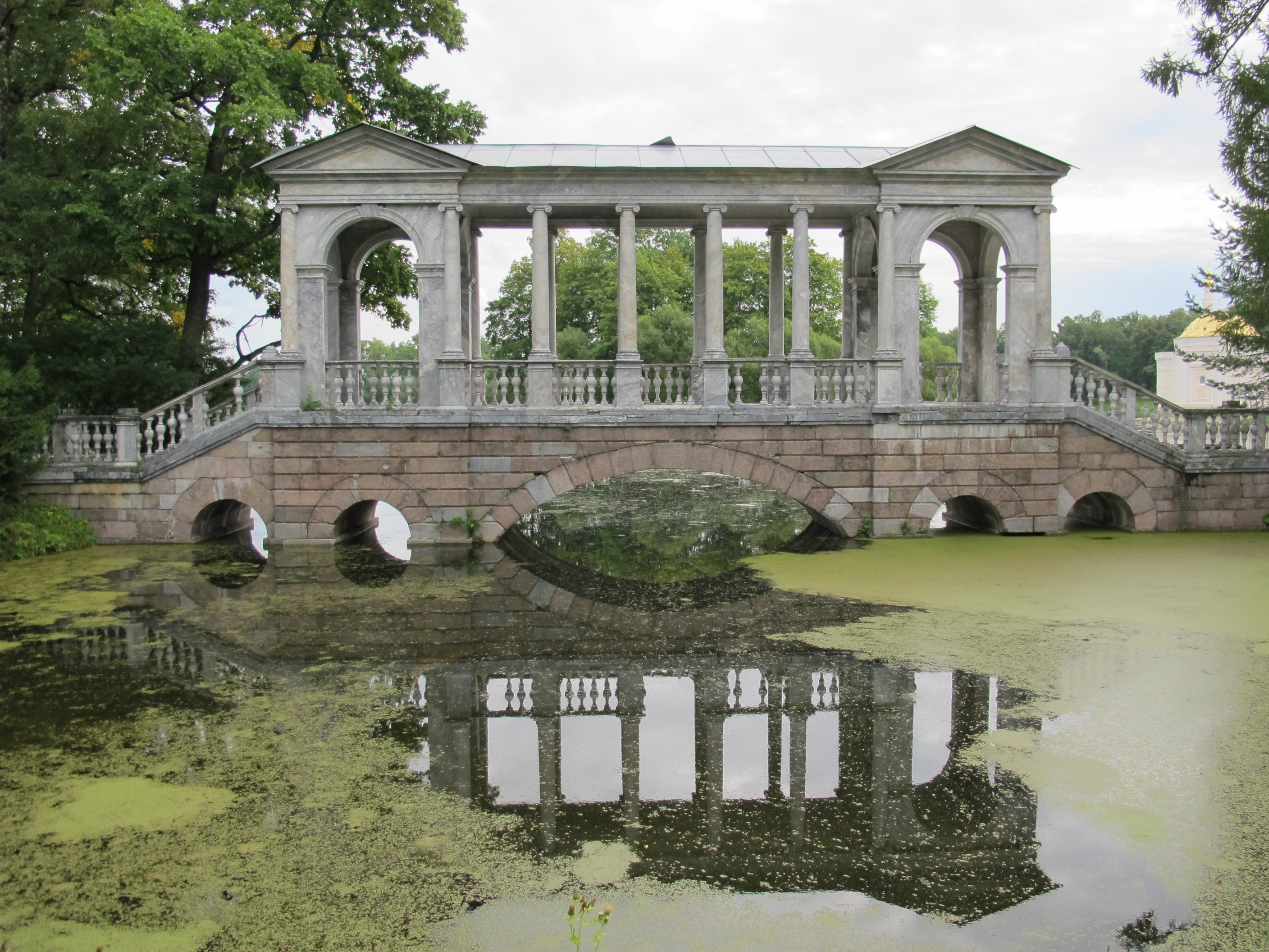 Marble Bridge